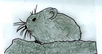 Al final de cada verano las picas juntan diferentes hierbas cerca de su madriguera, de esta forma se alimentan en invierno cuando viven temperaturas muy bajas